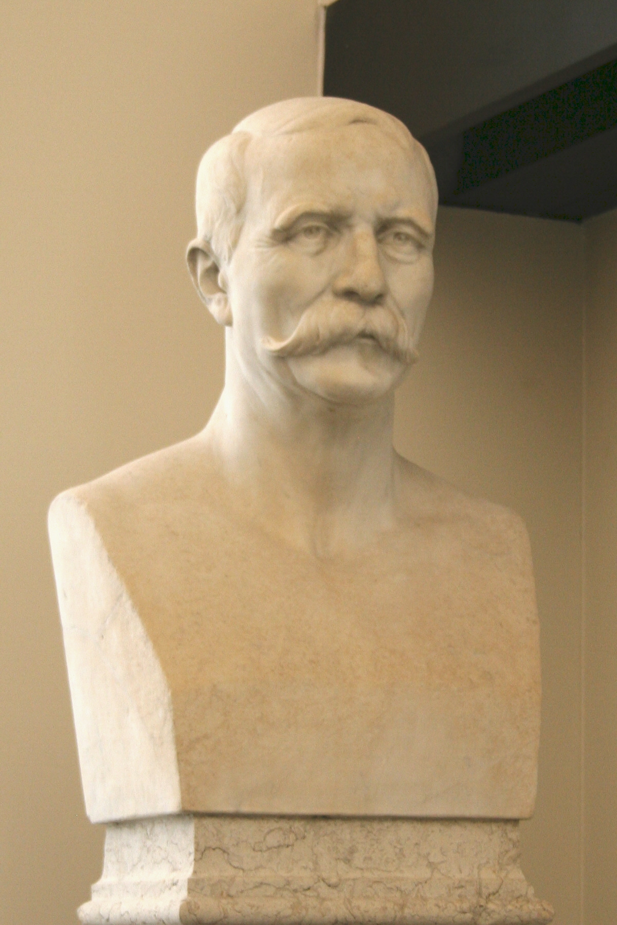 Buste de l'architecte Gaudensi Allar (1841-1904) sculpté par son frère André-Joseph Allar (1845-1926) se trouvant dans le palais d'art de Toulon.